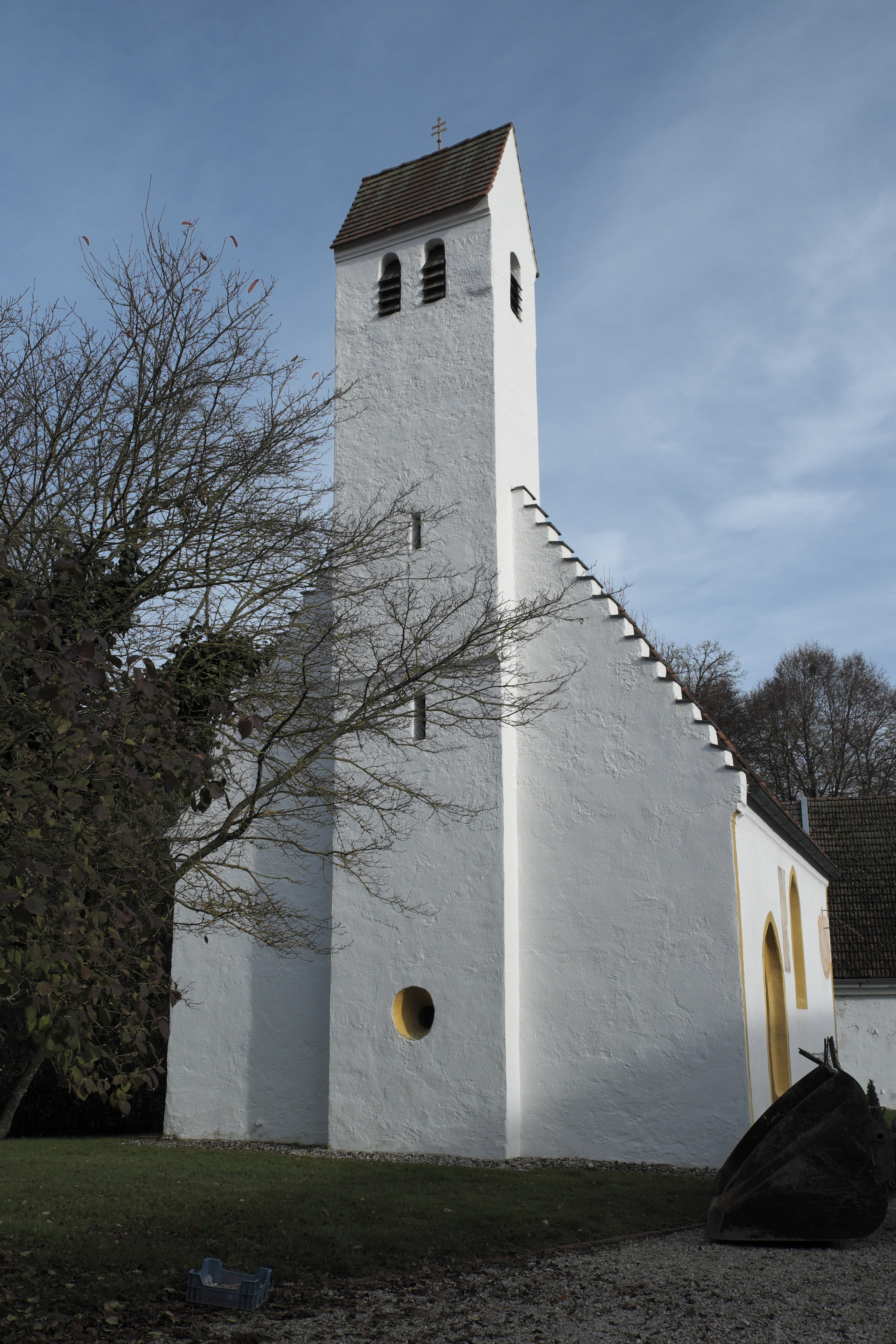 Katholische Kapelle Hl. Dreifaltigkeit in Sickertshofen (Schwabhausen) im Landkreis Dachau (Bayern/Deutschland)